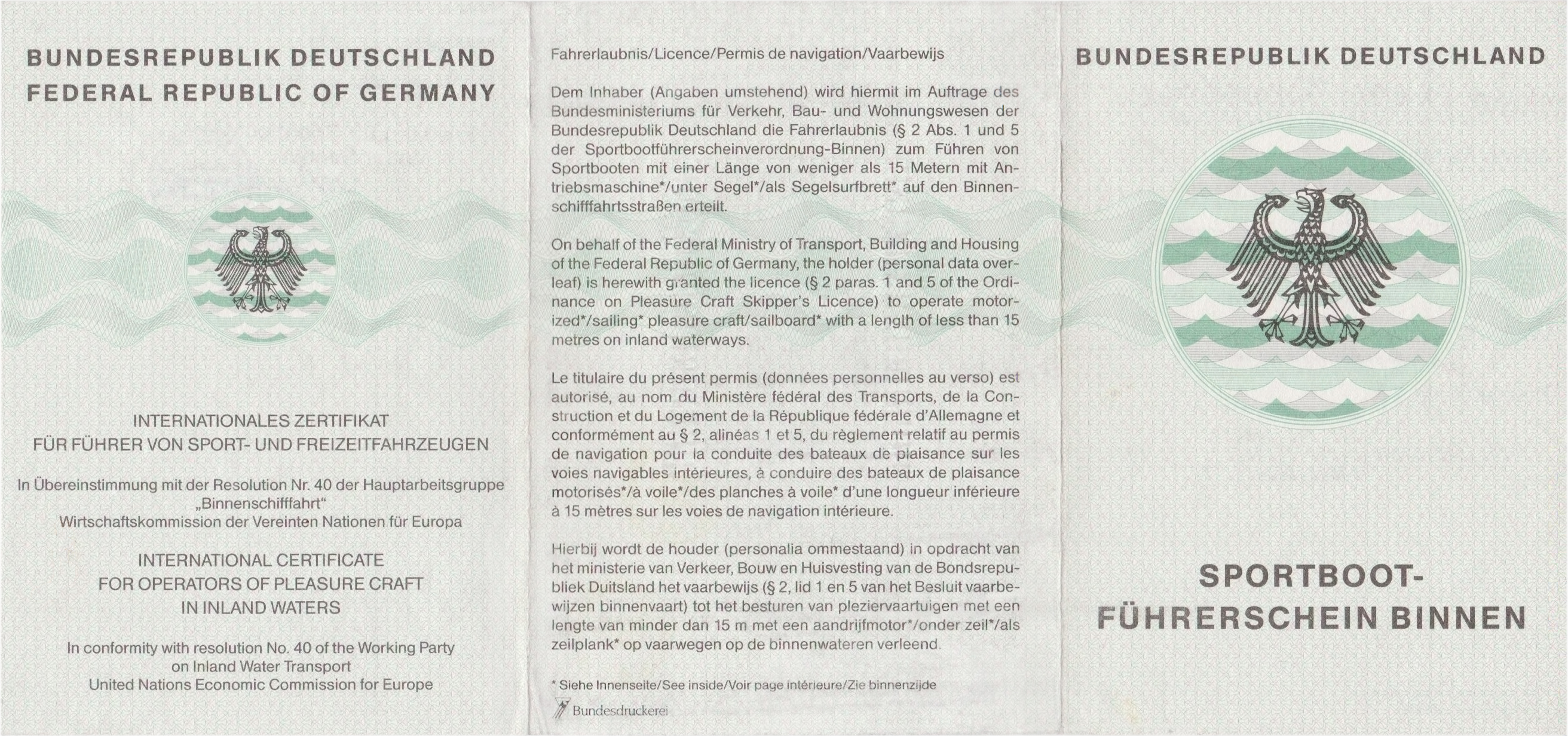 SBF Binnen